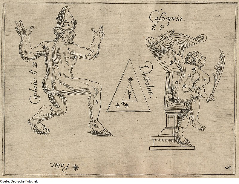 Original image description from the Deutsche Fotothek Astronomie & Sternbild